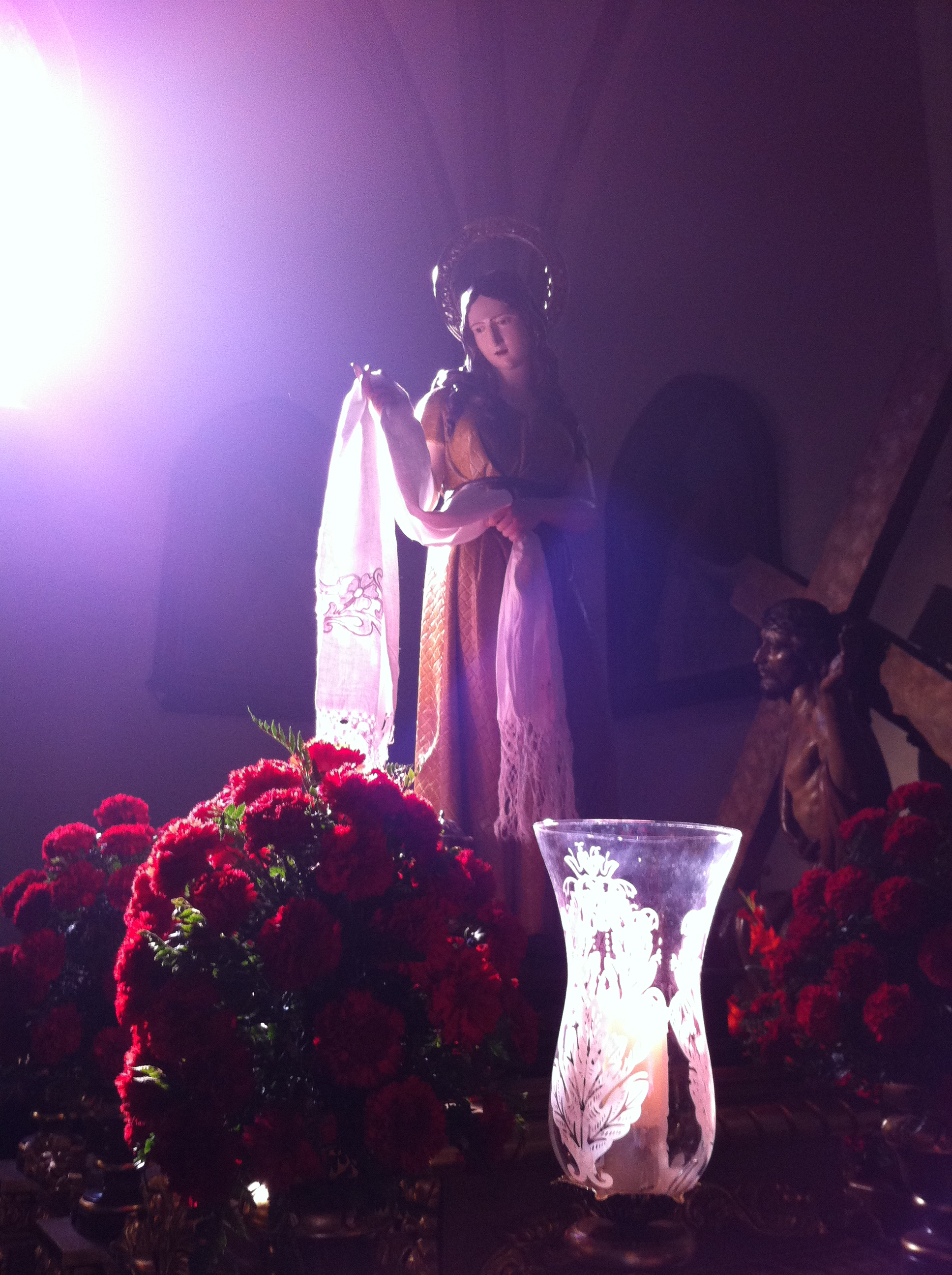 Foto de Santa María Magdalena en la Basílica de Llanes